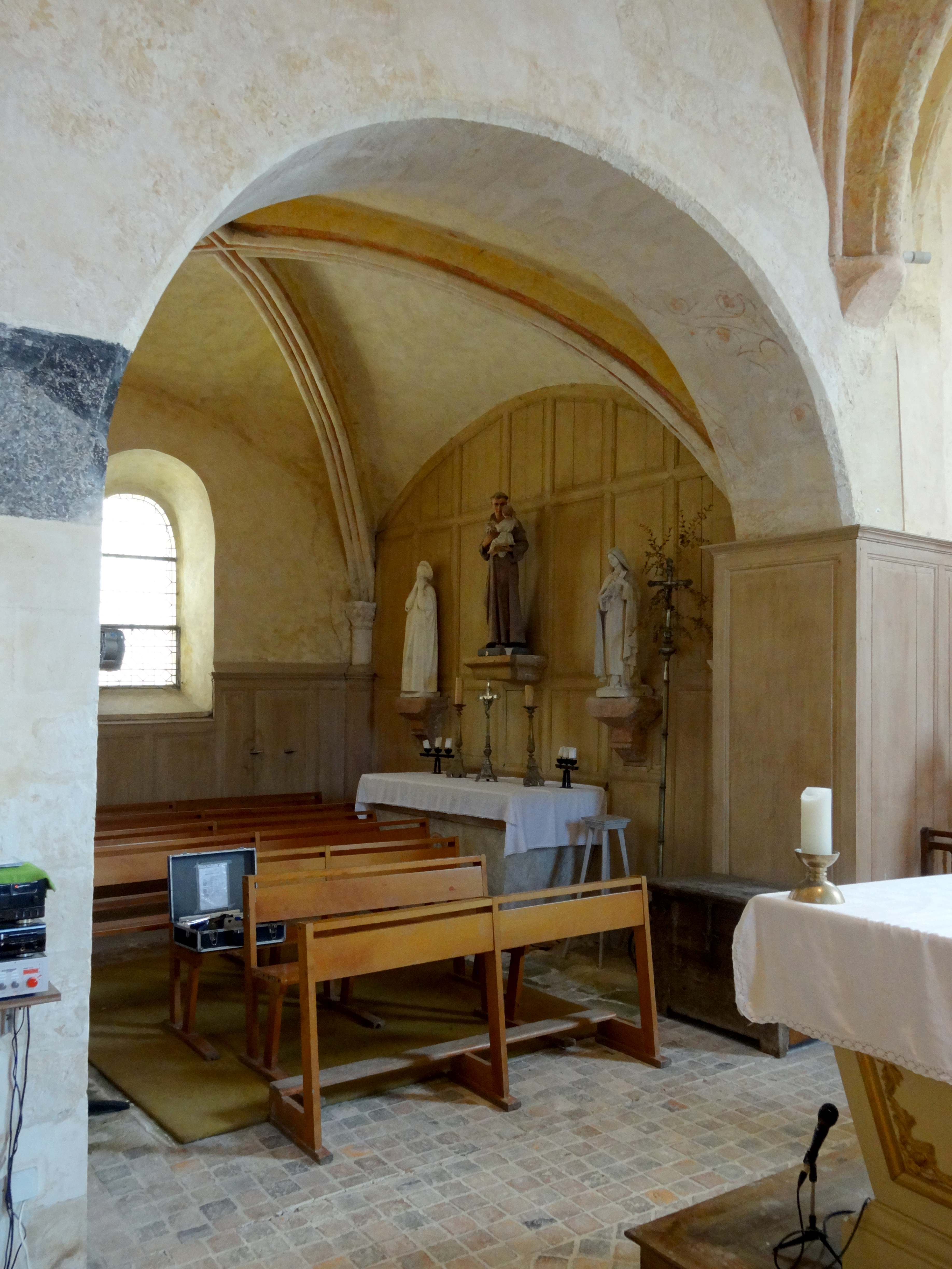 Intérieur de l'église - voir titre.